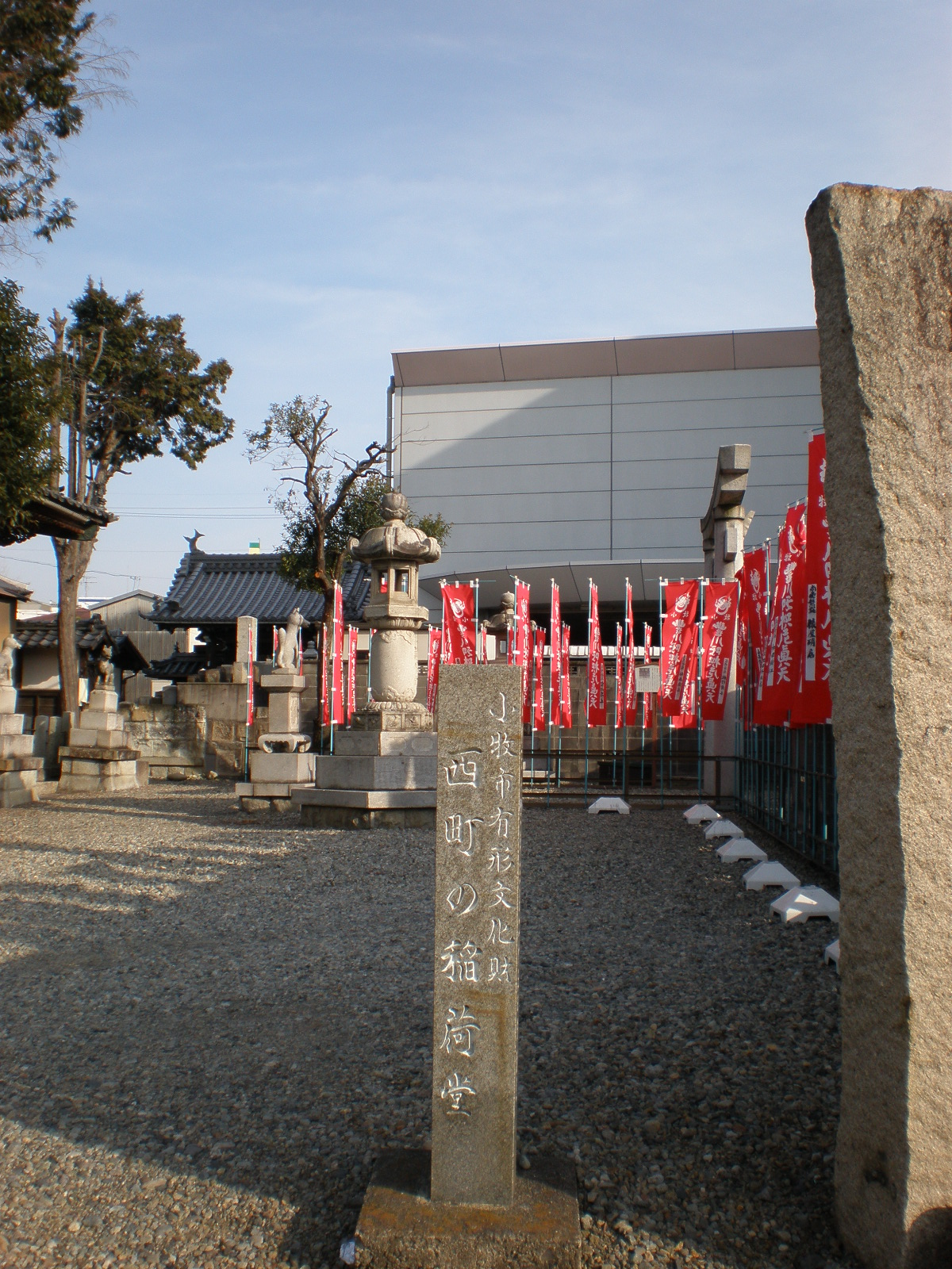 愛知県小牧市にある西町の稲荷堂